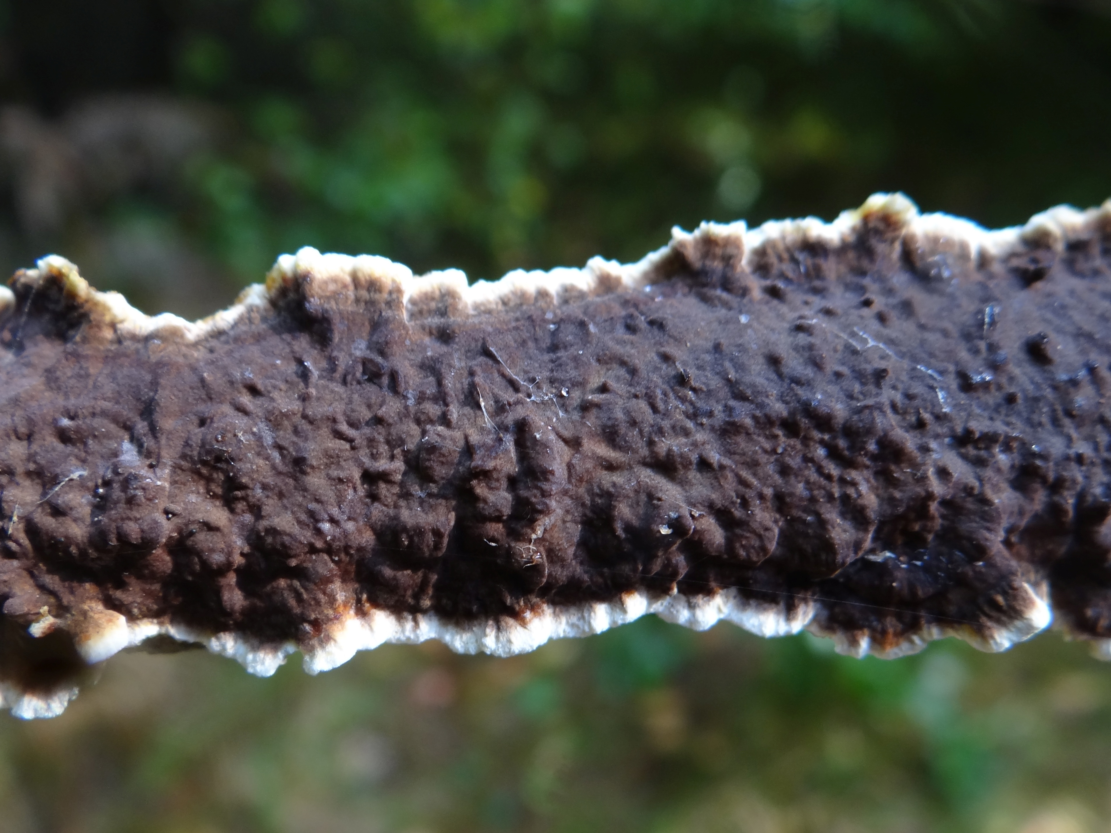 Veluticeps abietina. Location: Poland, Kamionna (województwo małopolskie)